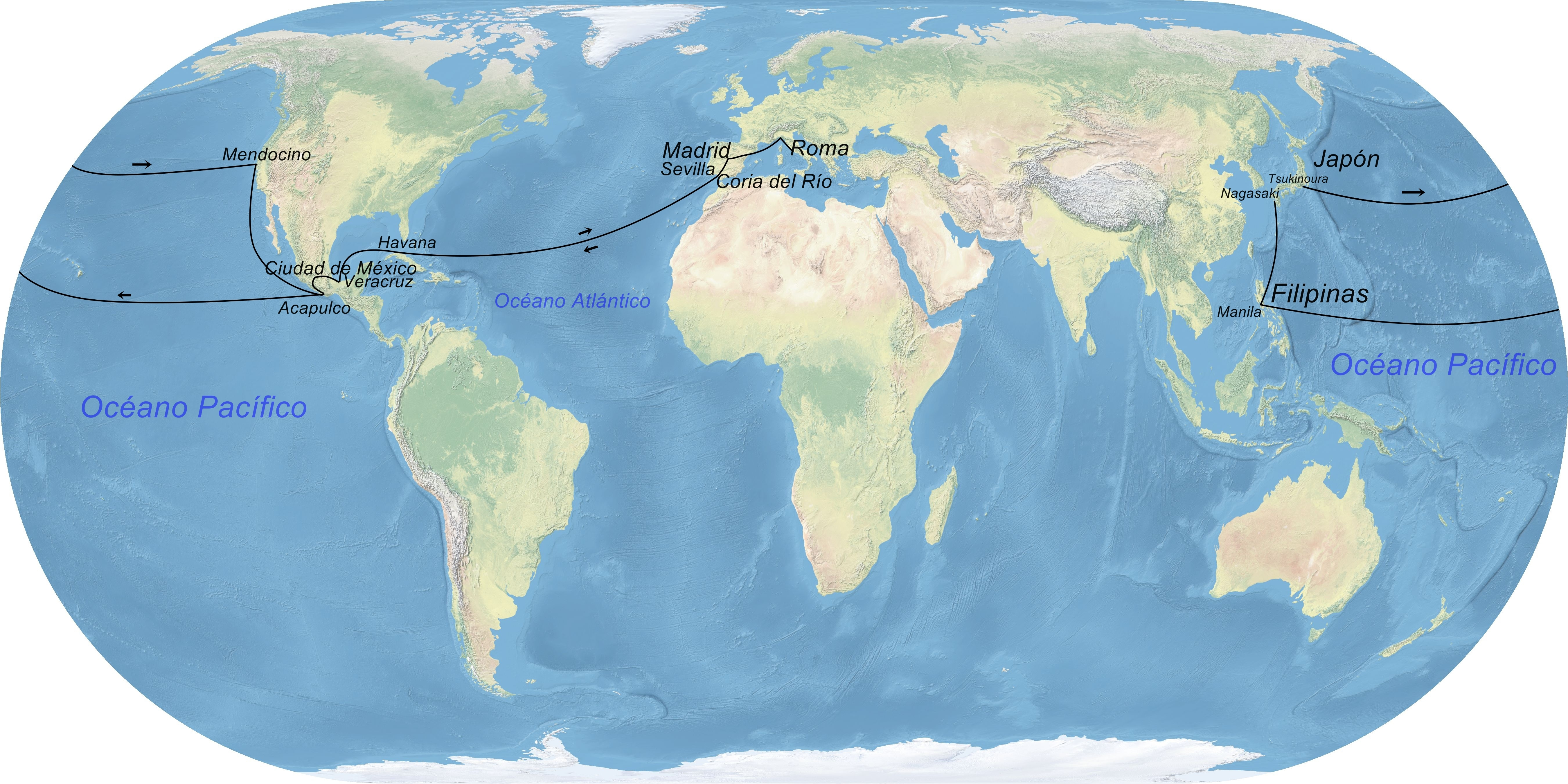 Embajada de Keisho en su recorrido completo desde Japón hasta Europa. El mapa sobre el que se han colocado las indicaciones es obra de Ktrinko, y se encuentra en Commons con el nombre de Eckert4.jpg